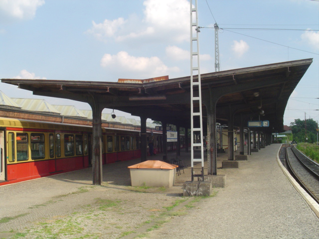 S-Bahnhof Erkner